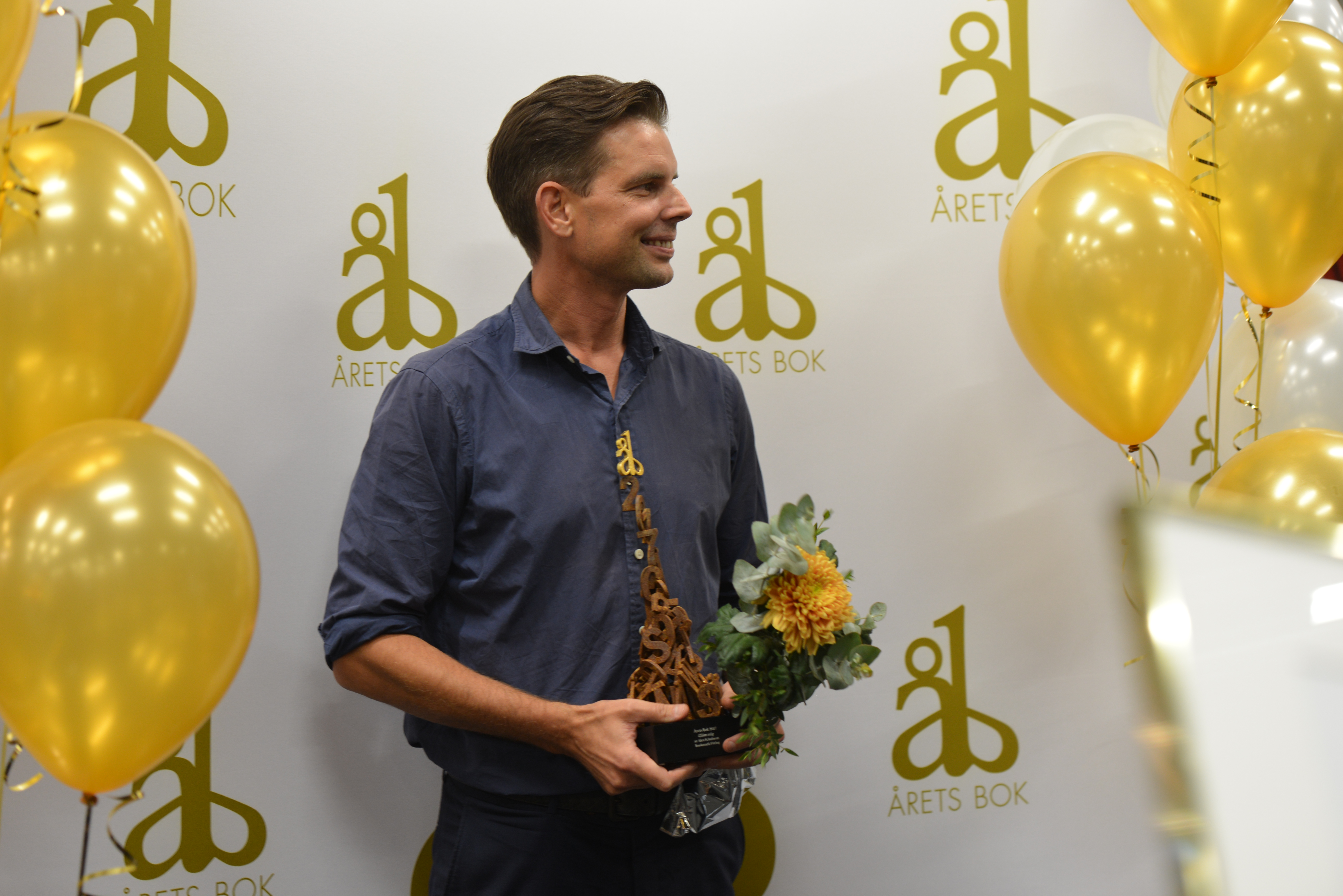 Alex Schulman vid prisutdelningen av Bonnier bokklubbars pris Årets bok 2017 på Bokmässan i Göteborg den 29 september 2017.